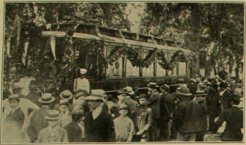 Inauguración oficial del Ferrocarril Eléctrico de Santiago a San Bernardo, 25 de febrero de 1908. El primer carro en la Alameda de las Delicias antes de partir.